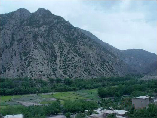 AhmadKhail in Zazi, Paktia province Afghanistan